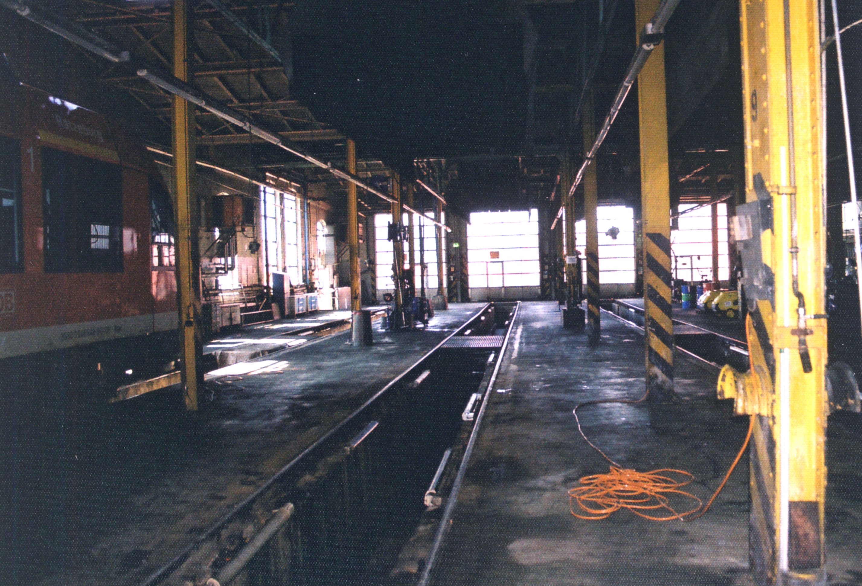 Rechteckhalle des Bw Lübeck; Aufgenommen im Mai 2010